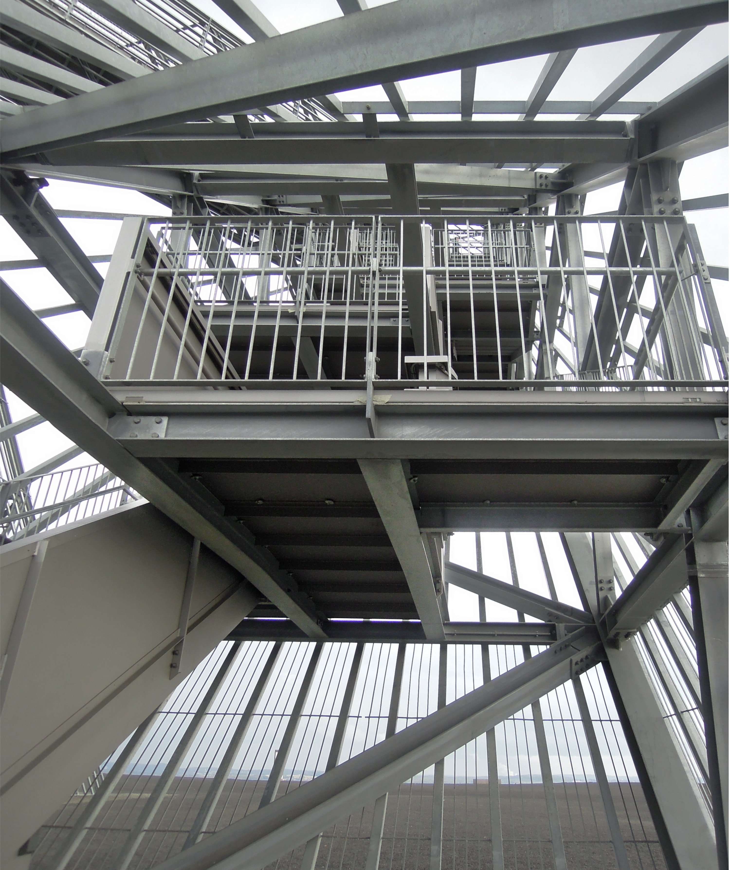 Innenleben